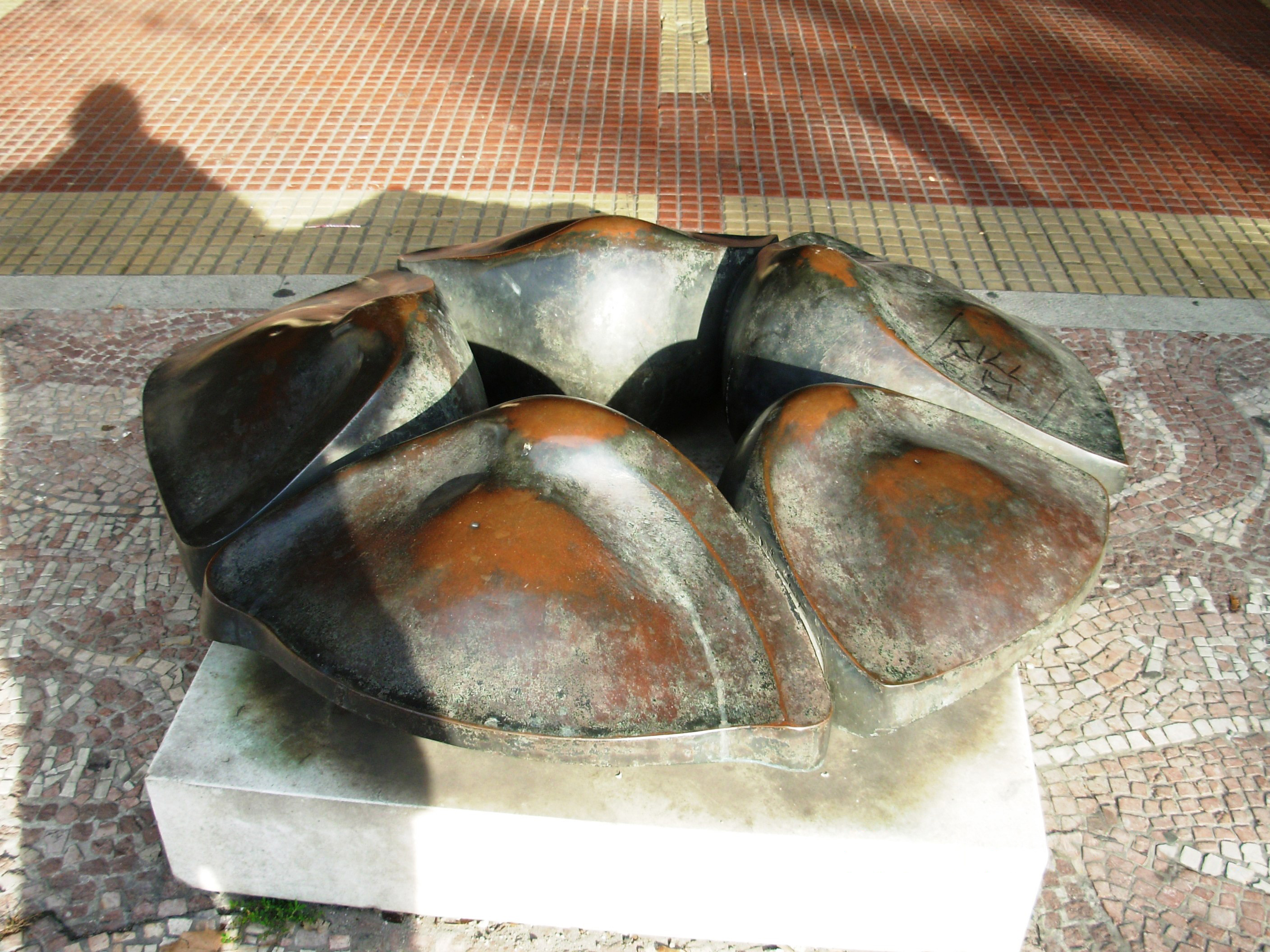 Споменик на месту Главњаче, Београд. Сликао Голдфингер